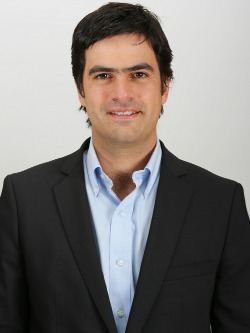 Felipe de Mussy Hiriart